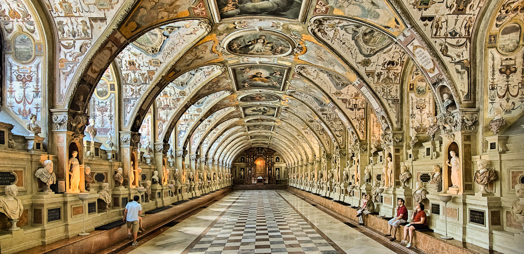 Das Bild zeigt das Antiquarium, eines der ältesten Renaissance-Gewölbe Europas